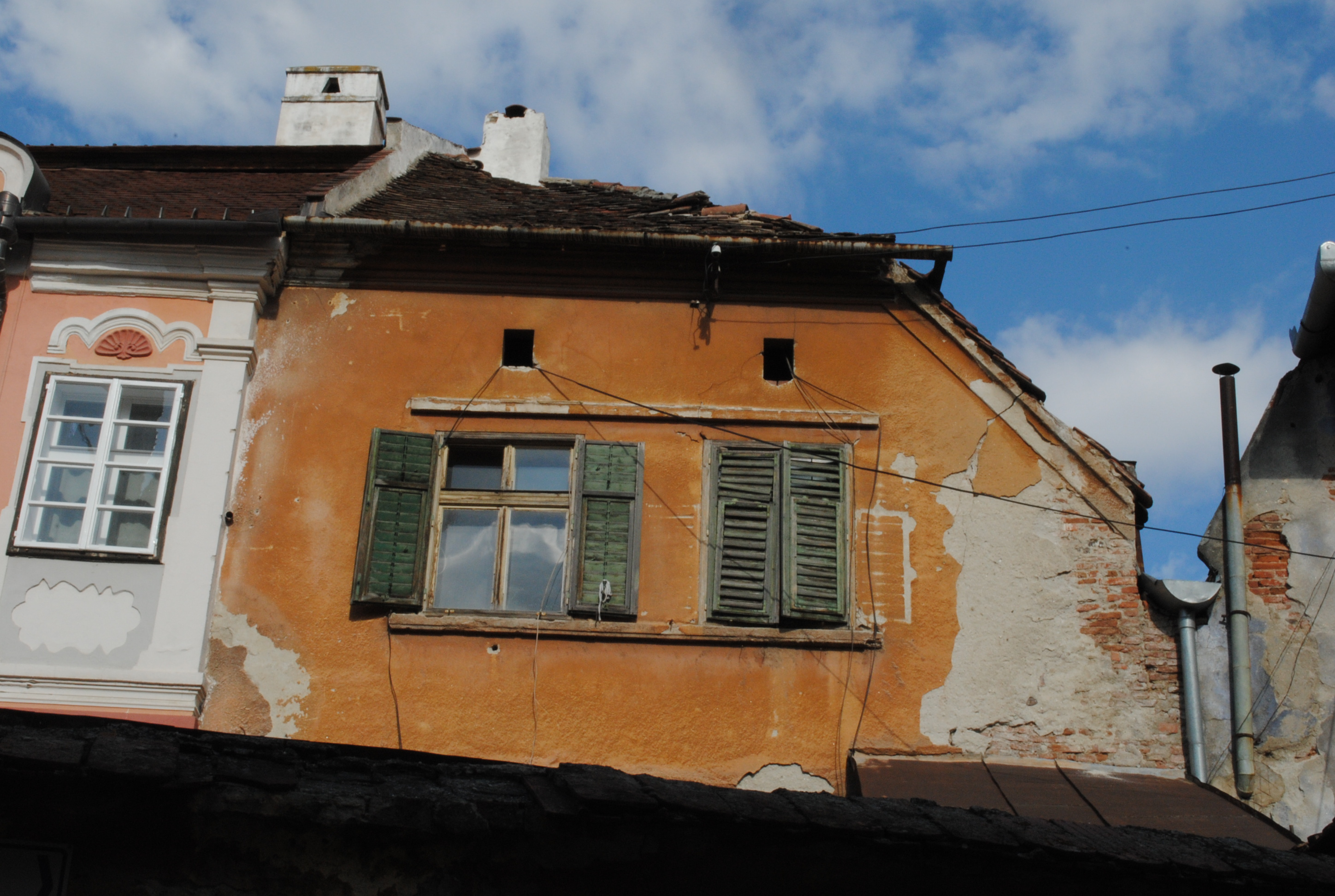 Casă, sec. XV - XVI, sec. XVIII - înc. sec. XIX